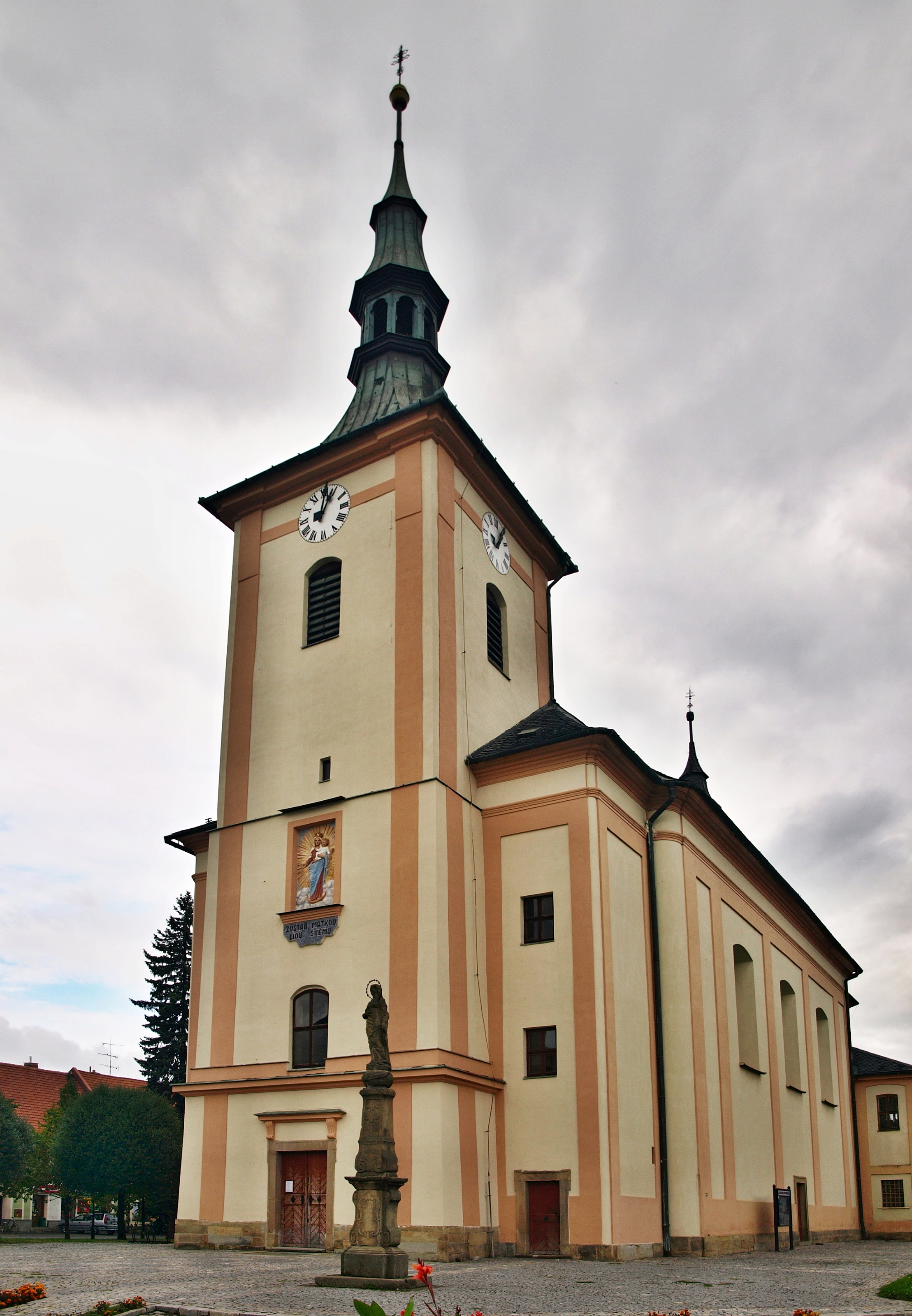 Kostel svatého Vavřince, náměstí Osvobození, Drahotuše.